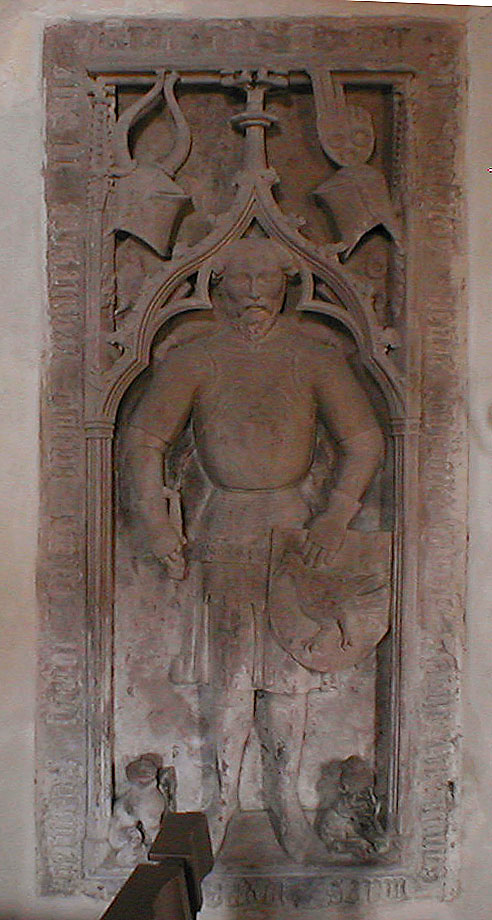 Weiprecht I. von Helmstatt (1343-1408), Epitaph in der Totenkirche Neckarbischofsheim